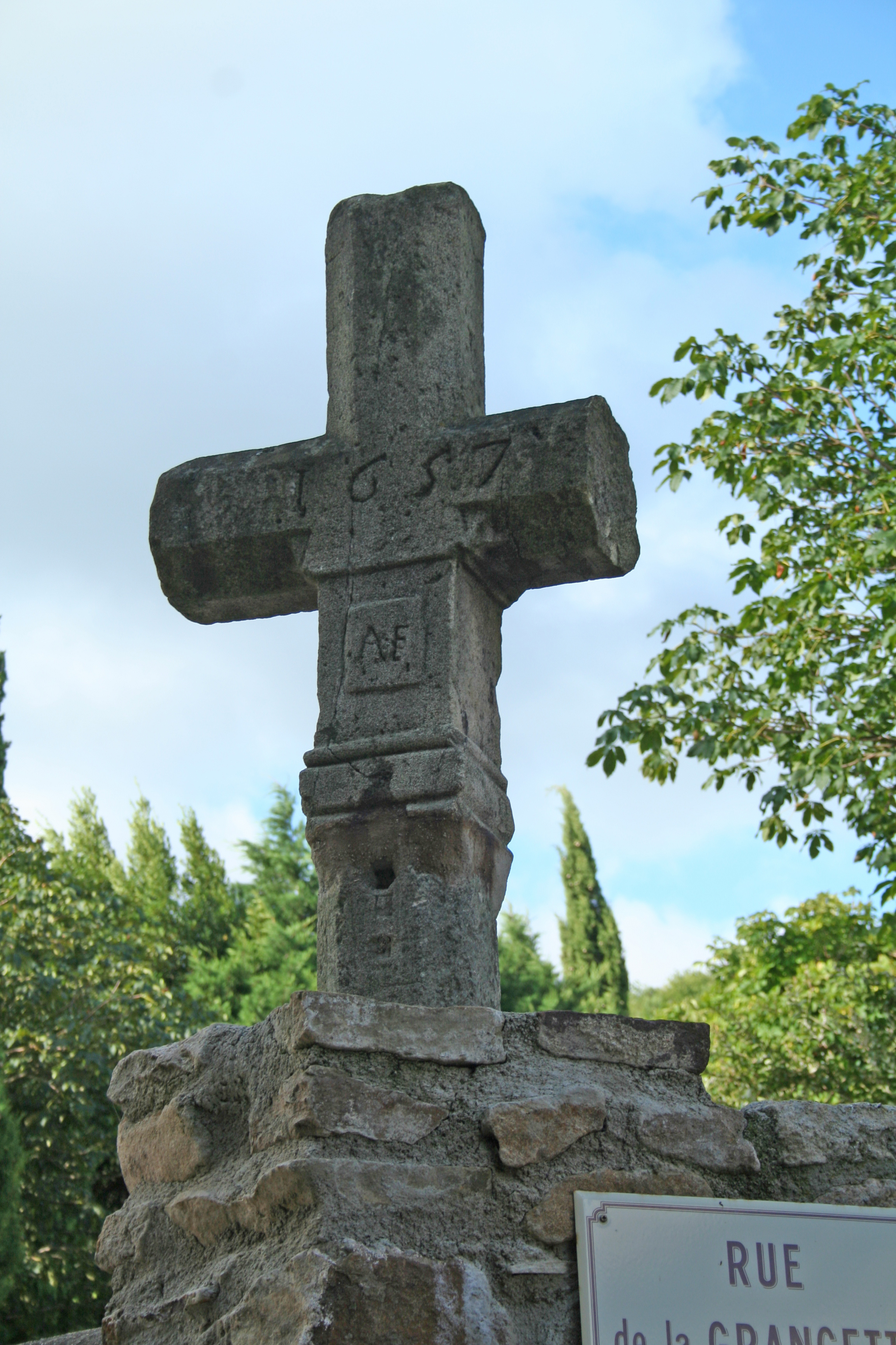 Camplong (Hérault) - croix de 1657.